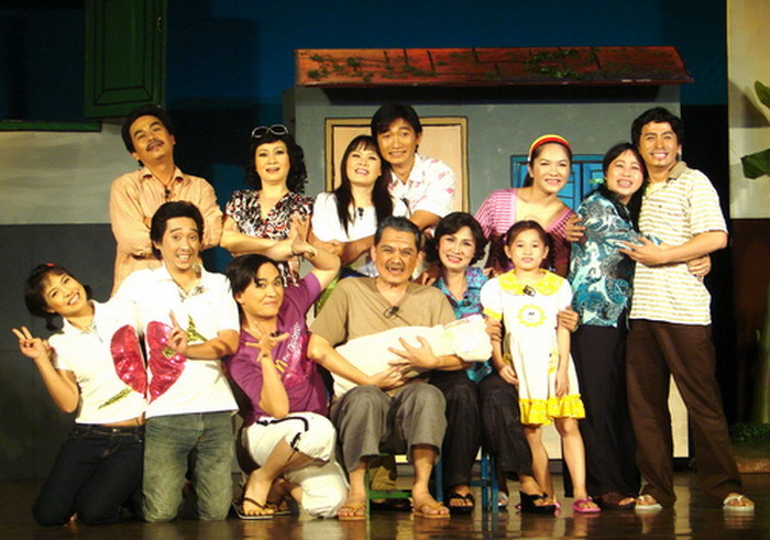 Nghệ sĩ Hữu Châu bên cạnh các đồng nghiệp (người ngồi giữa)